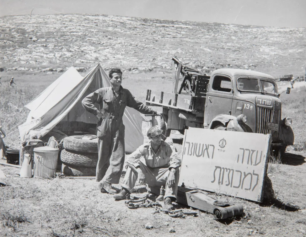 עזרה ראשונה למכוניות, חברת "ש.ח.ד.", בדרך לירושלים הנצורה